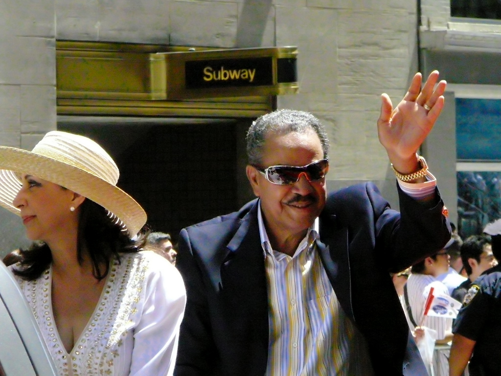 Juan Marichal